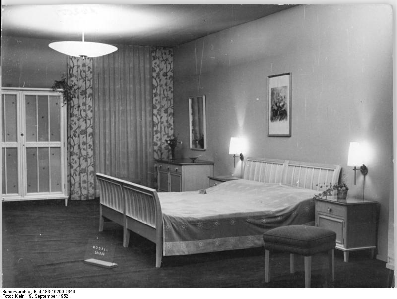 Leipzig, Messe, Musterschlafzimmer Leipziger Messe 1952 - Schaufenster des friedlichen Aufbaus. Vom 7. - 17. September 1952 findet die internatioanle Leipziger Messe als große Technische Messe und Mustermesse in 13 Messehallen (75000 qm) auf einem ausgedehnten Freigelände (25000 qm) und in 15 Messehäusern (80000 qm) statt. Möbelausstellung im Messehaus "Union" UBz: Schlafzimmer- Entwurf von Architekt Robert Schamann, Deutsche Rotbuche, gebleicht und poliert. Zentralbild-Klein 9.9.1952